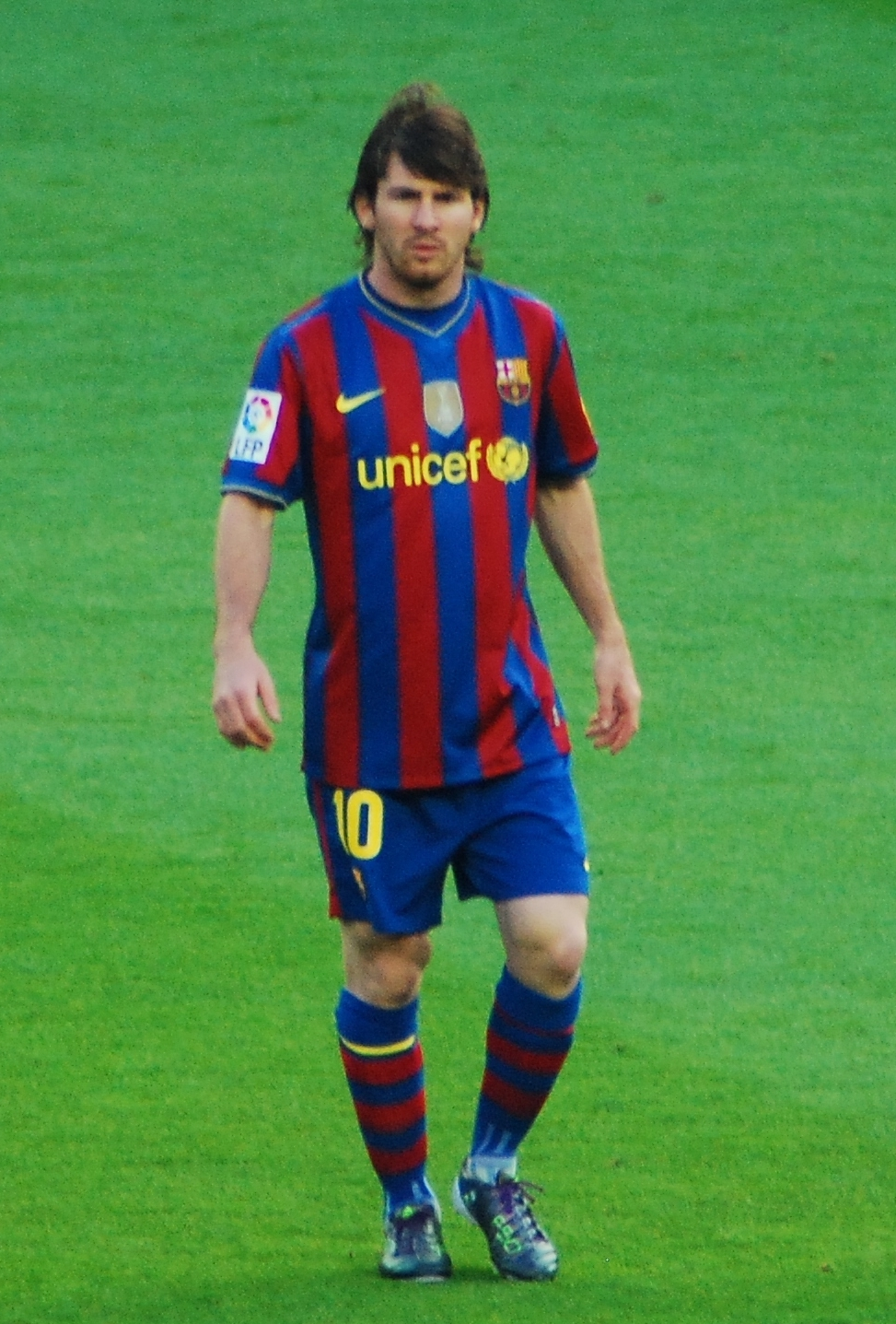 Lionel Messi, en un partido de la Liga 2009-2010 que enfrentó al FC Barcelona contra el Real Valladolid.